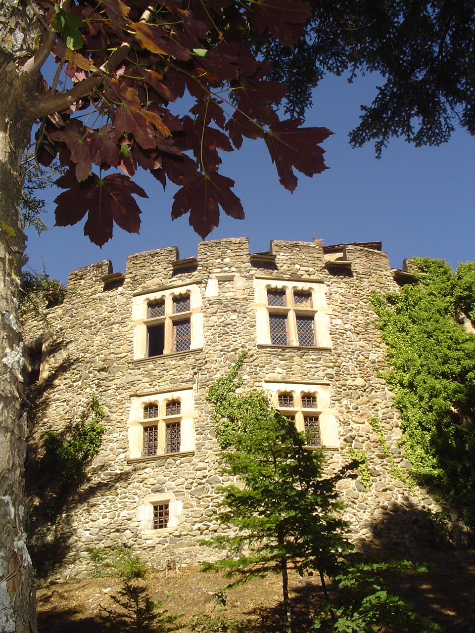 Castello di Introd This is a photo of a monument which is part of cultural heritage of Italy.